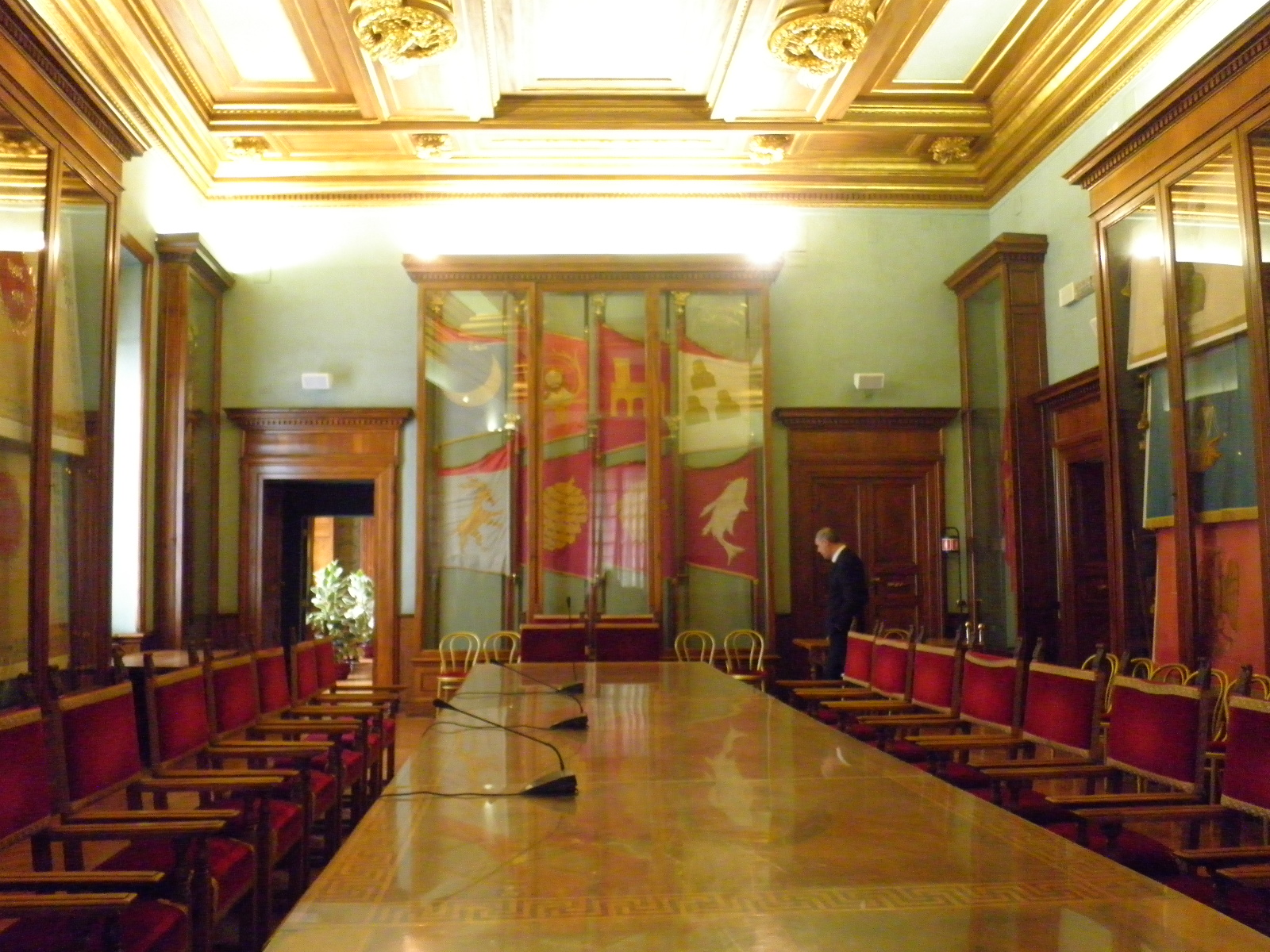 Roma, palazzo senatorio al Campidoglio. Sala delle bandiere. Stendardi antichi dei rioni cittadini.